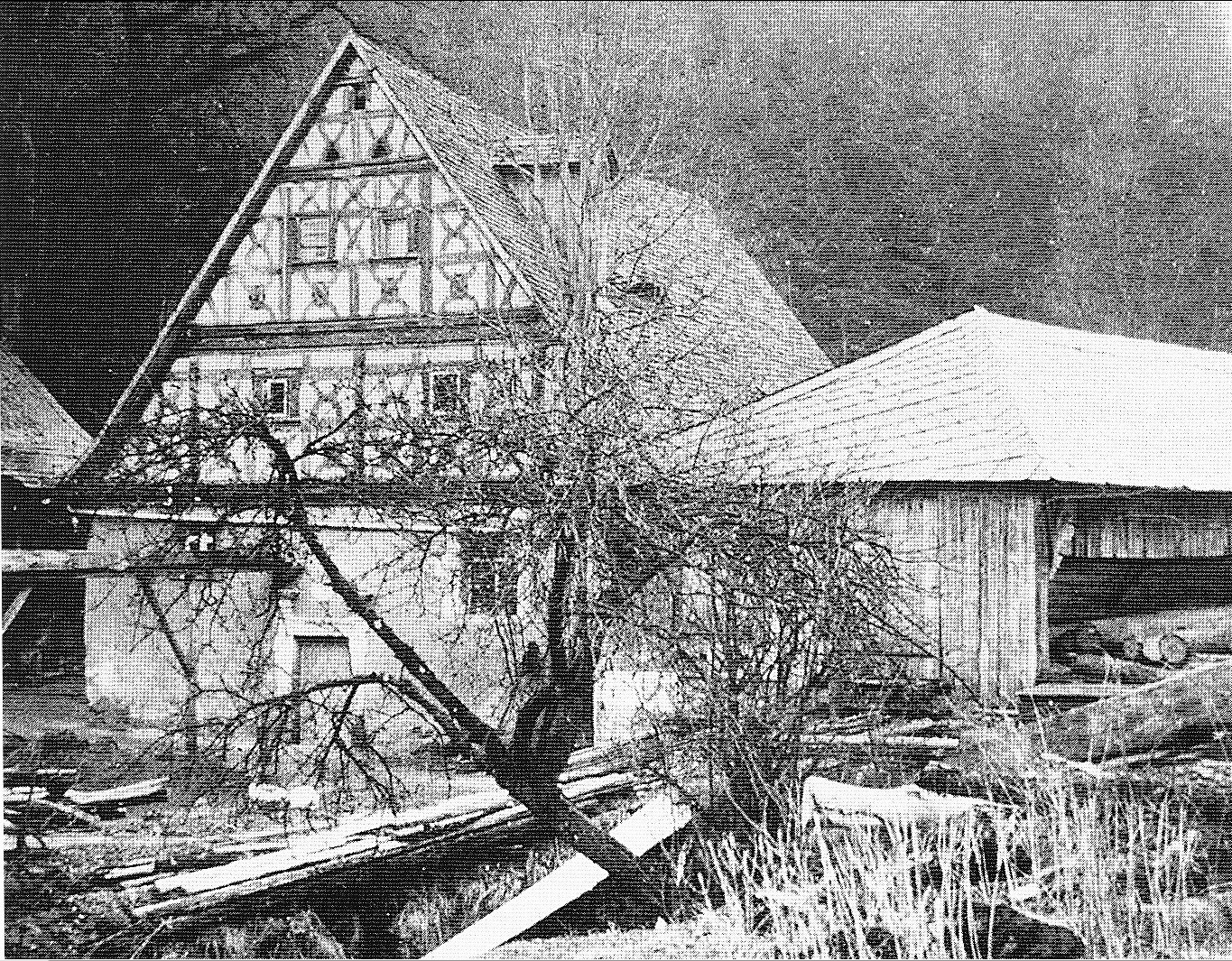 Foto der Schwarzmühle im Kleinziegenfelder Tal um 1940. Rechts ist das abgebrochene Sägewerk zu sehen.